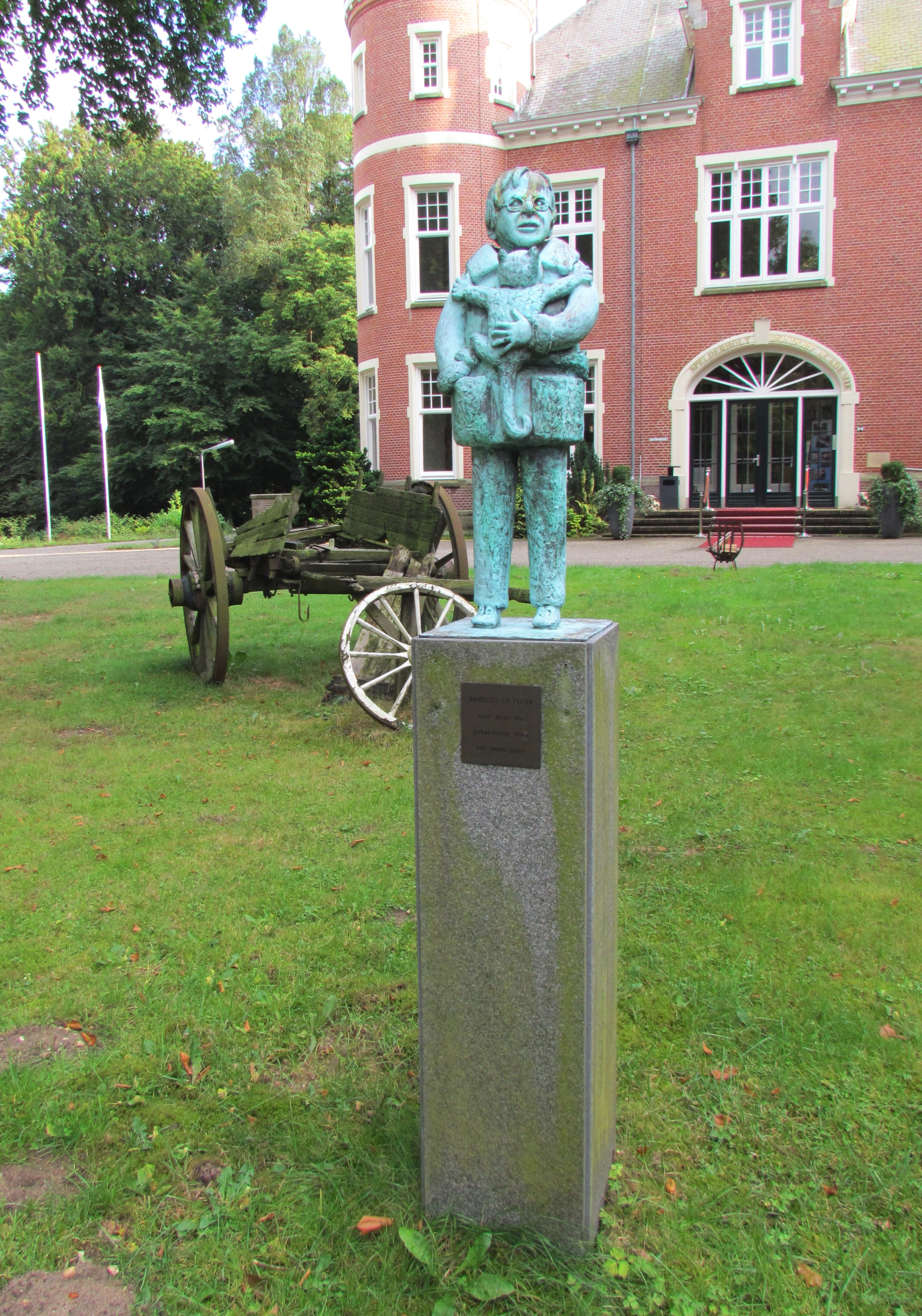 Annelies la Fleur, 'voor allen die gehandicapt door het leven gaan'. Koperen beeld van Marijke Ravenswaaij-Deege voor Villa Spelderholt bij Beekbergen (NL). Onthuld op 21 september 2001 door Pieter van Vollenhoven